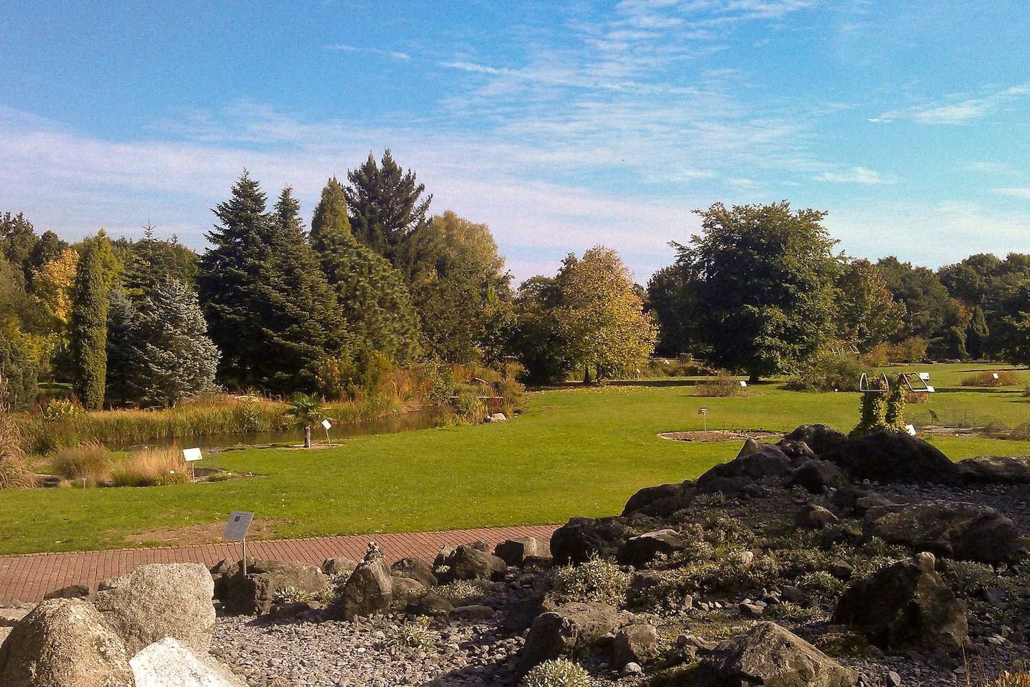 Alpinum mit Blick auf die systematische Abteilung, Botanischer Garten (Düsseldorf)